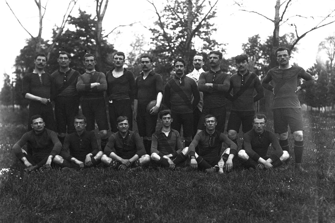 Le 126e Régiment d’Infanterie de Brives, en mai 1908 (rugby à XV)